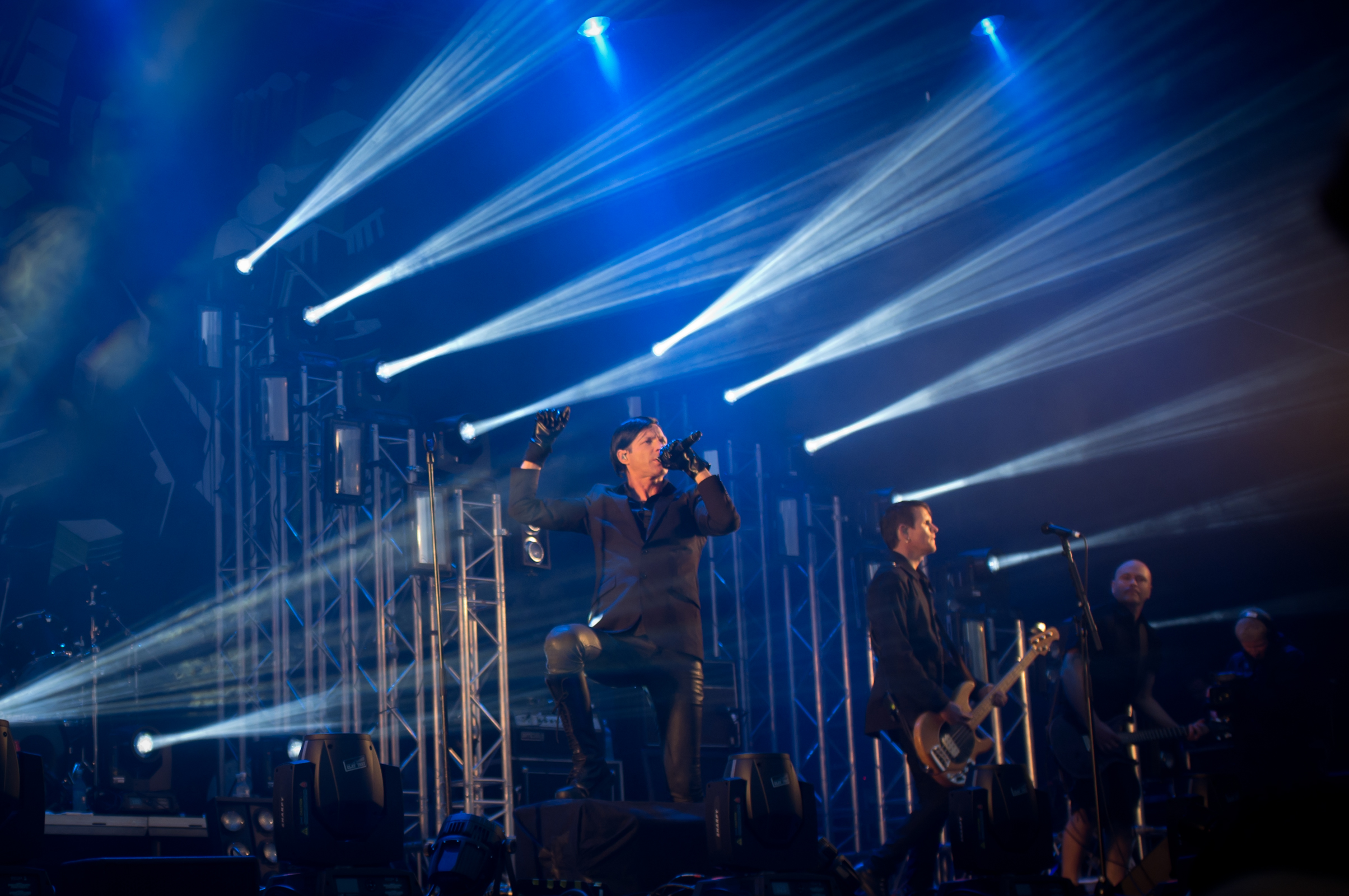 Slottsfjell 2012 - Seigmen